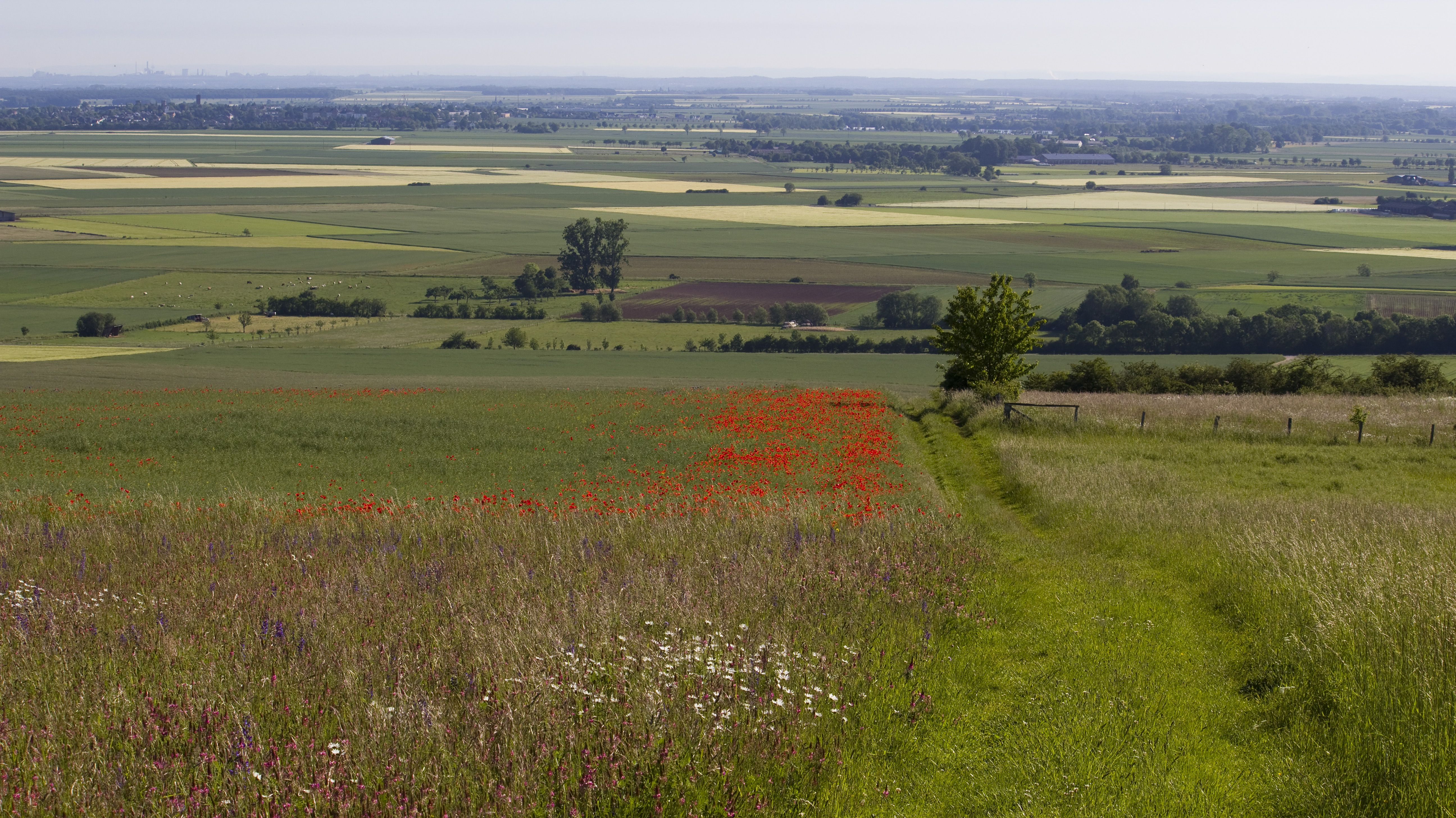 Blick vom Bürvenicher Berg nach Osten, NSG „Bürvenicher Berg und Tötschberg“